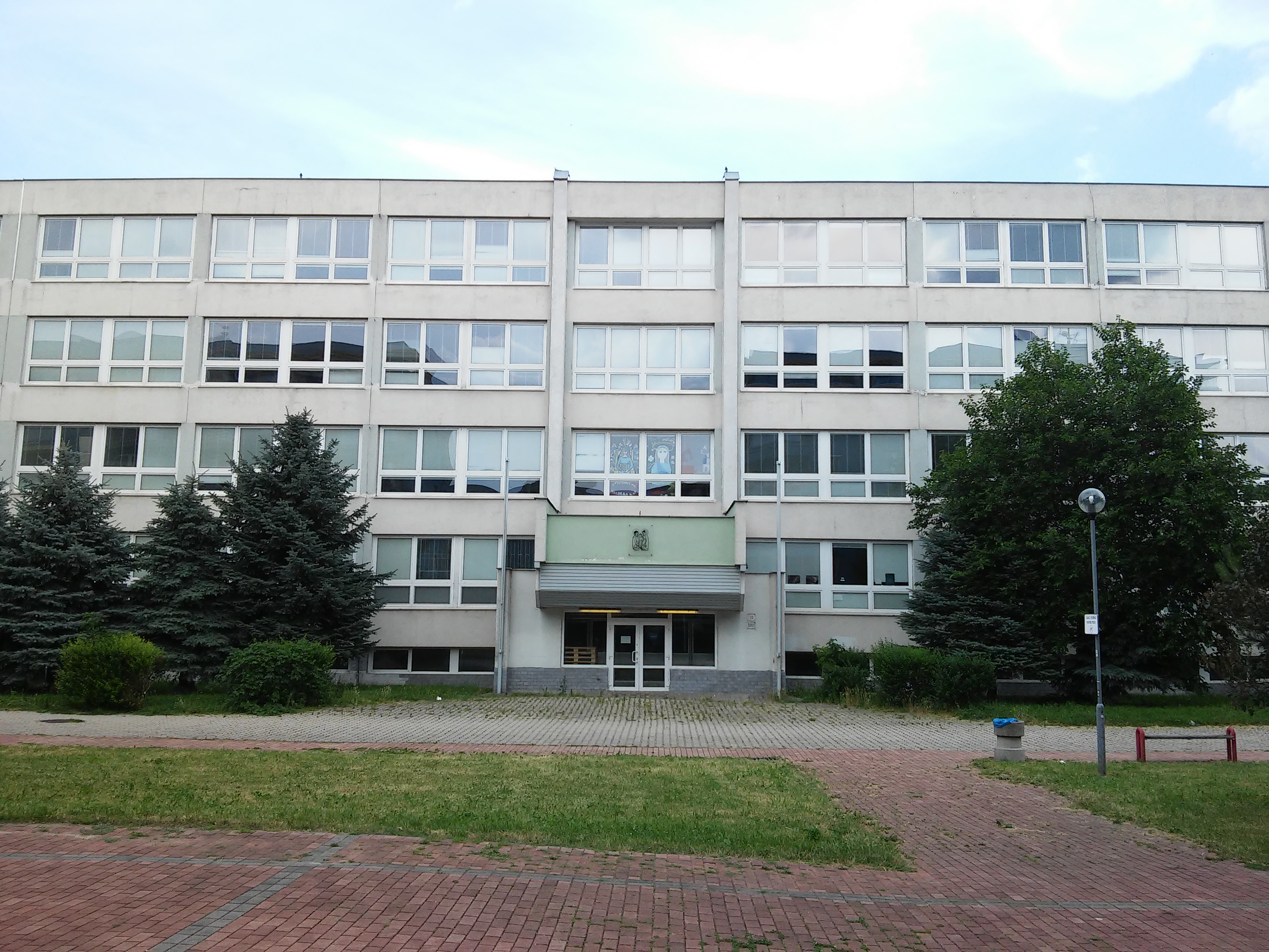 Gercenova 10, Petržalka, Bratislava